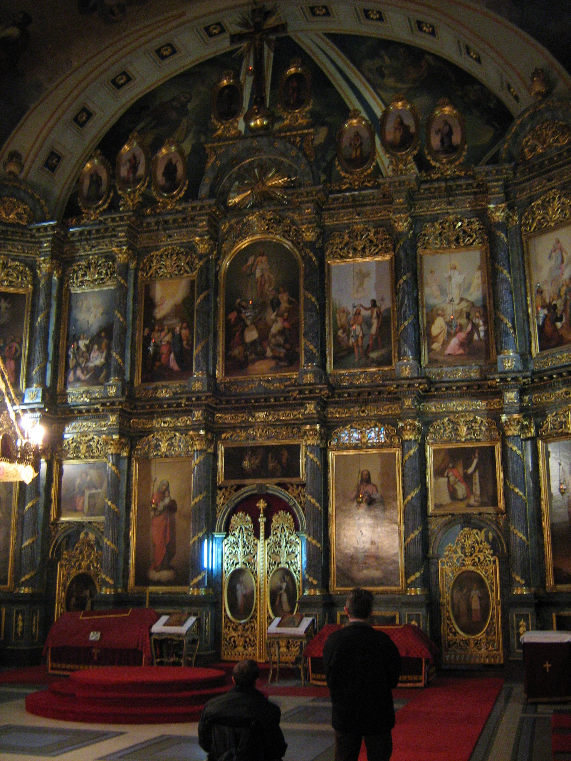 Саборна црква у Београду, иконостас.